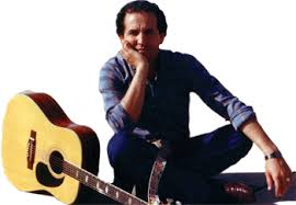 Ammouri M'bark chanteur Amazigh